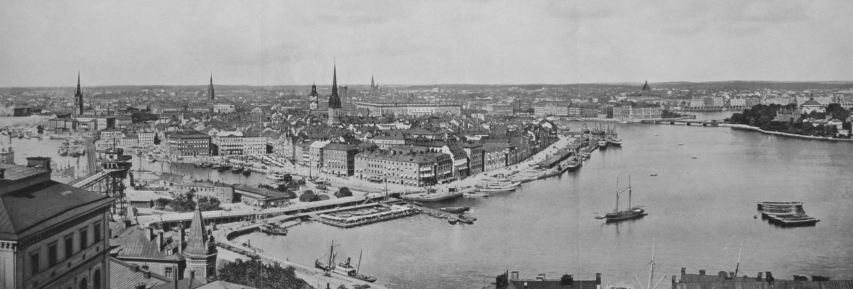 Panorama över Gamla stan och Saltsjön från Mosebacke vattentorn